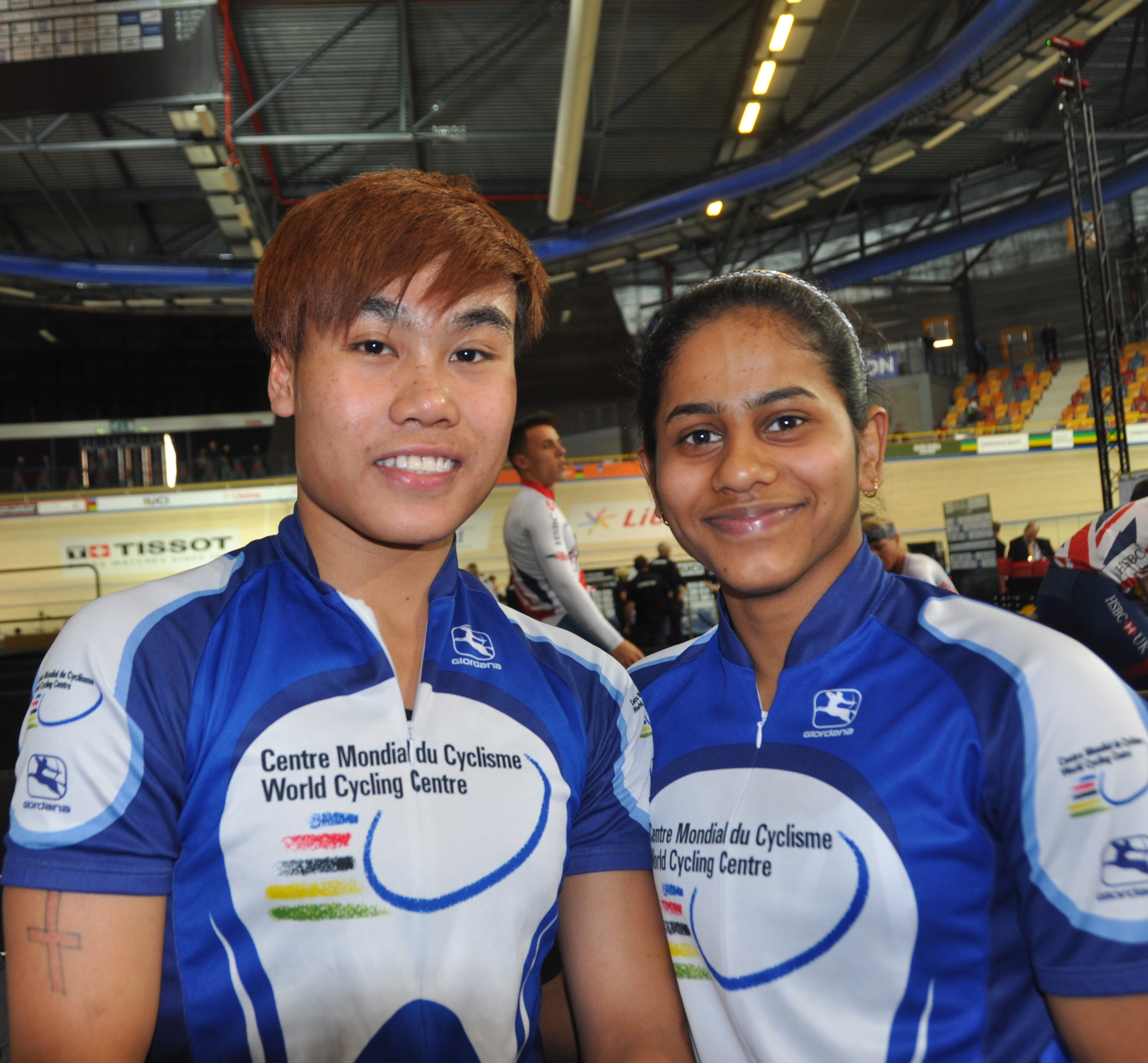 Deborah Deborah (l.), und Alena Reji, indische Radsportlerinnen